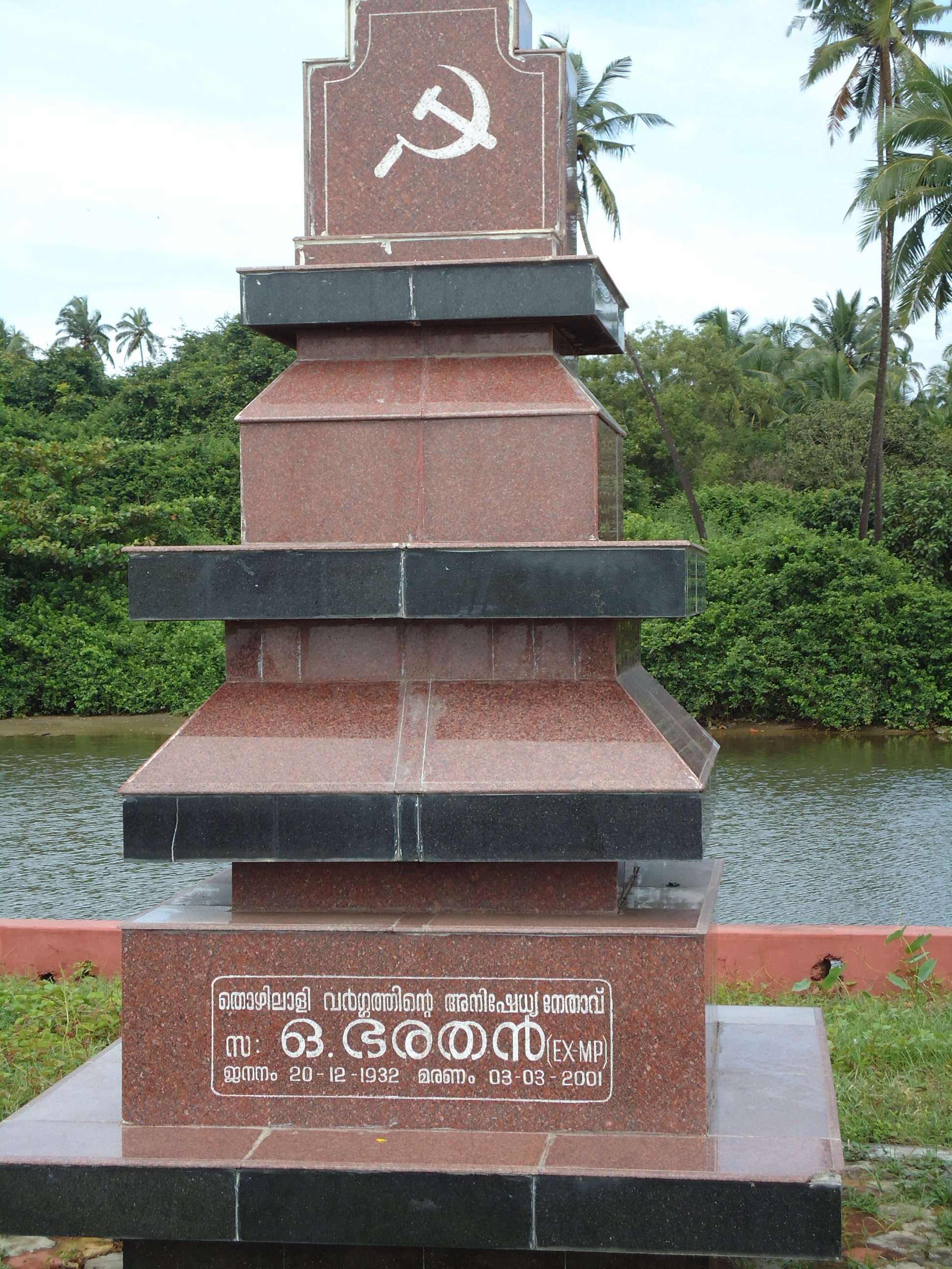 ഒ ഭരതന്റെ ശവകുടീരം